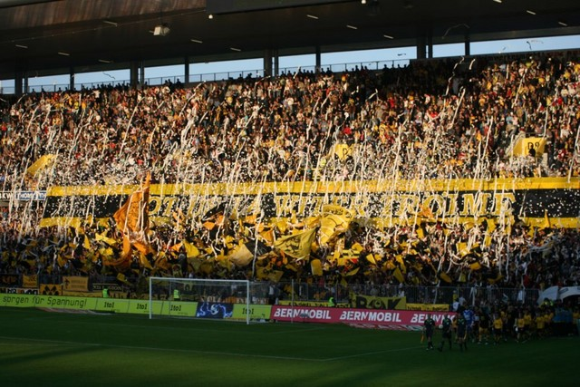 Choreographie der YB-Ultras im Spiel YB-Xamax im Mai 2008